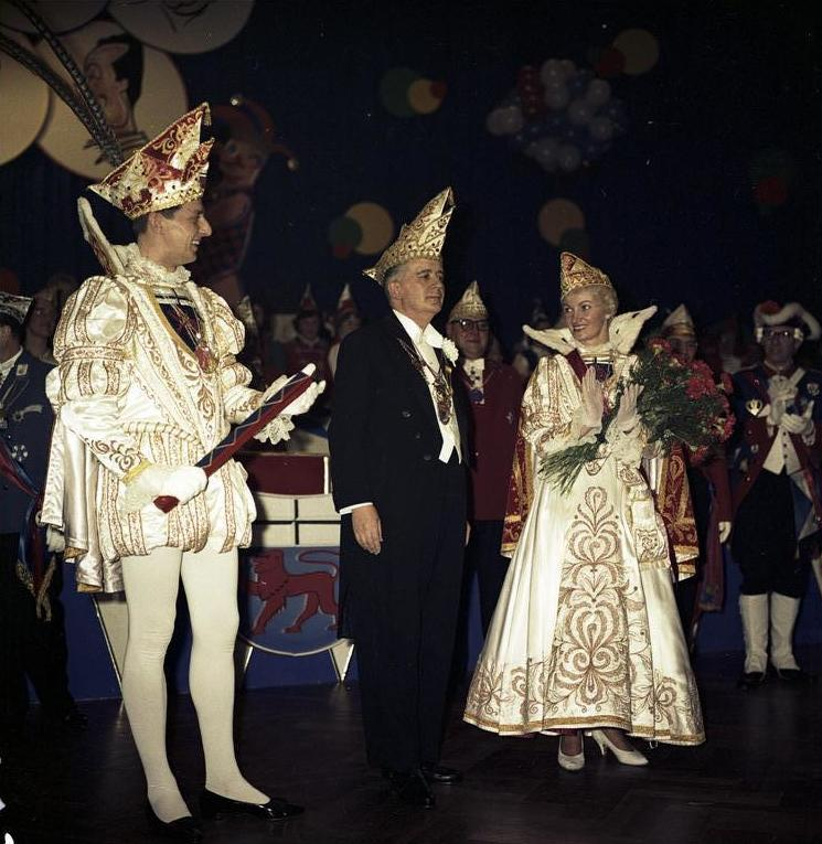 Karneval 1961 in Bonn Prinzen-Proklamation in der Beethovenhalle